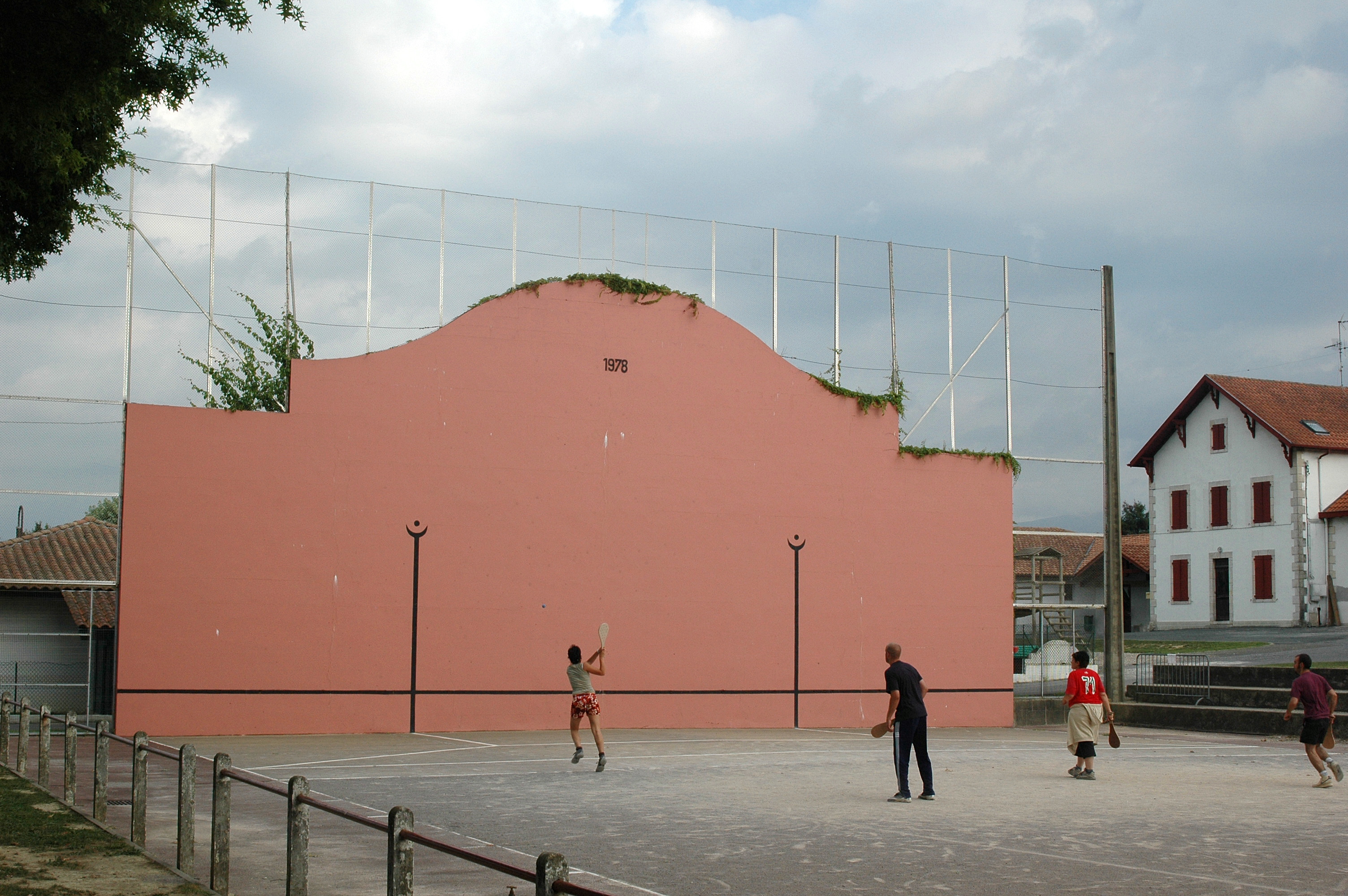 Ustaritz, partie de pala. Photo prise le 08/08/06 par Harrieta171